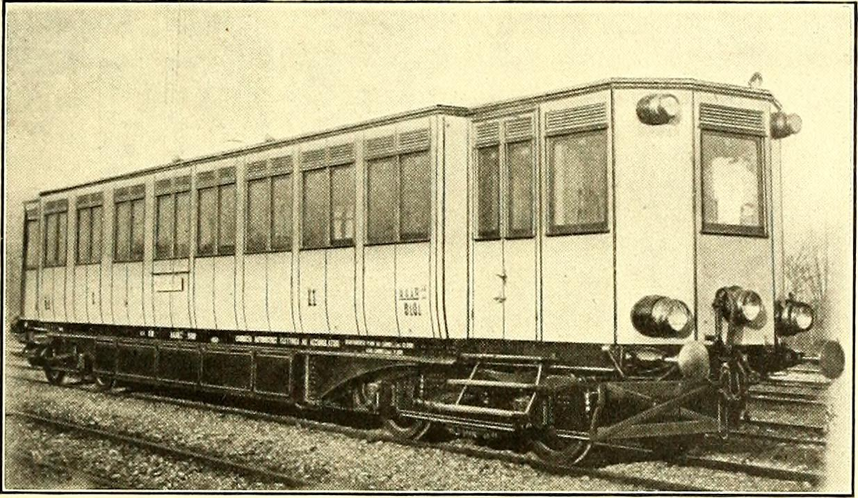 Automotrice ad accumulatori n. 5101 della Rete Mediterranea.